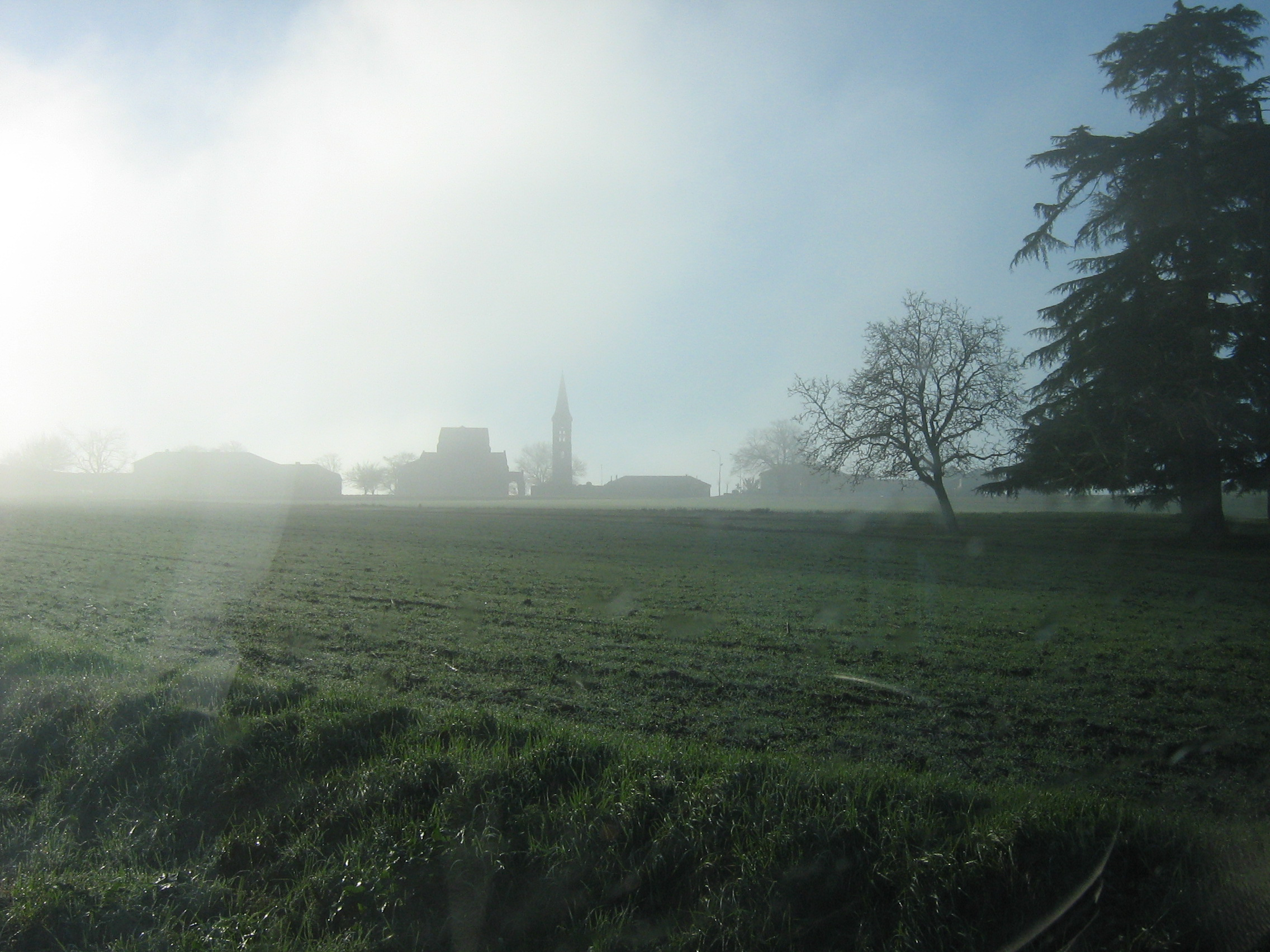 L'église de Saint-Vincent-de-Lamontjoie au matin de janvier par beau temps.